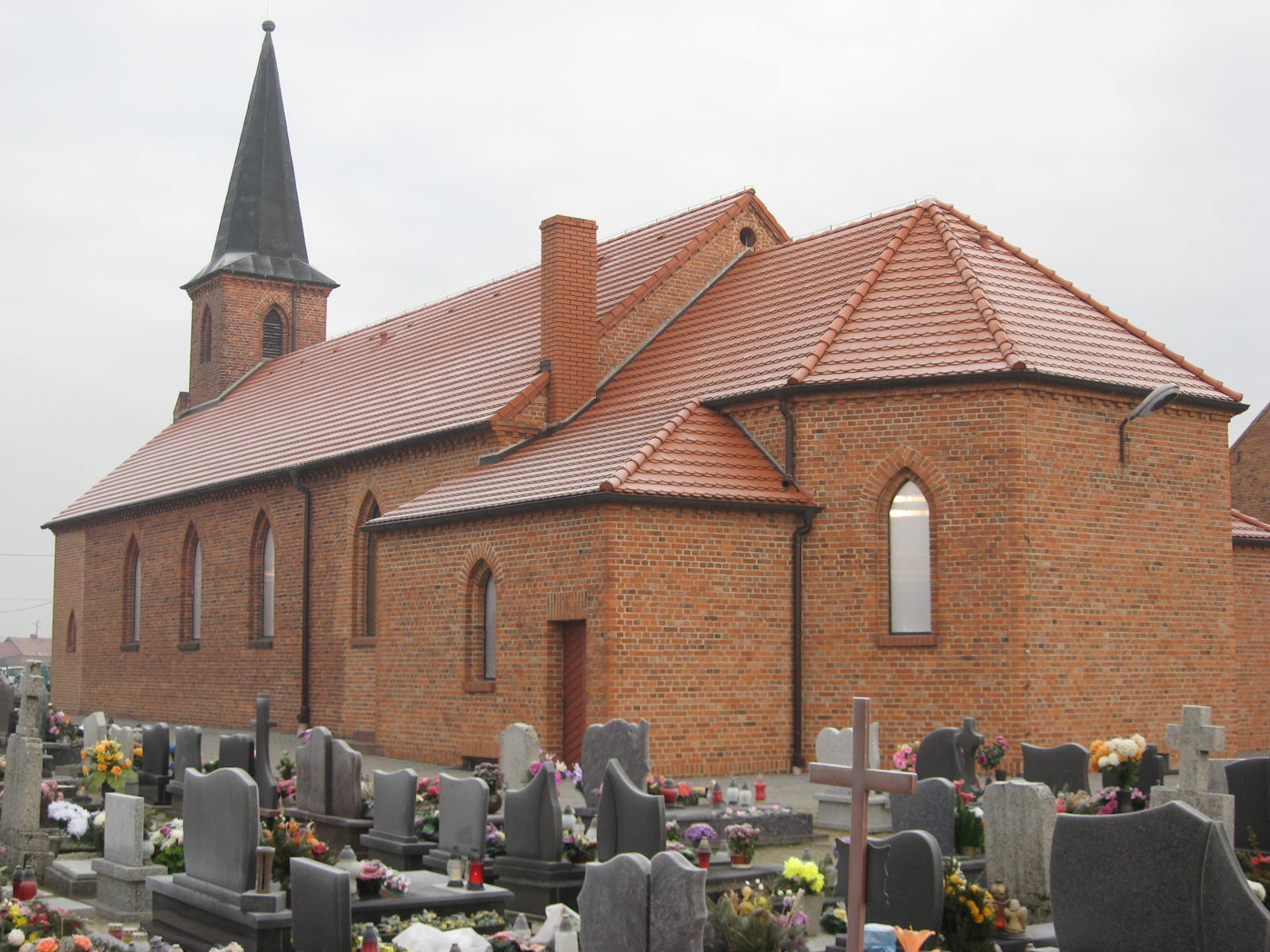 Kościół Świętej Rodziny w Jasieniu